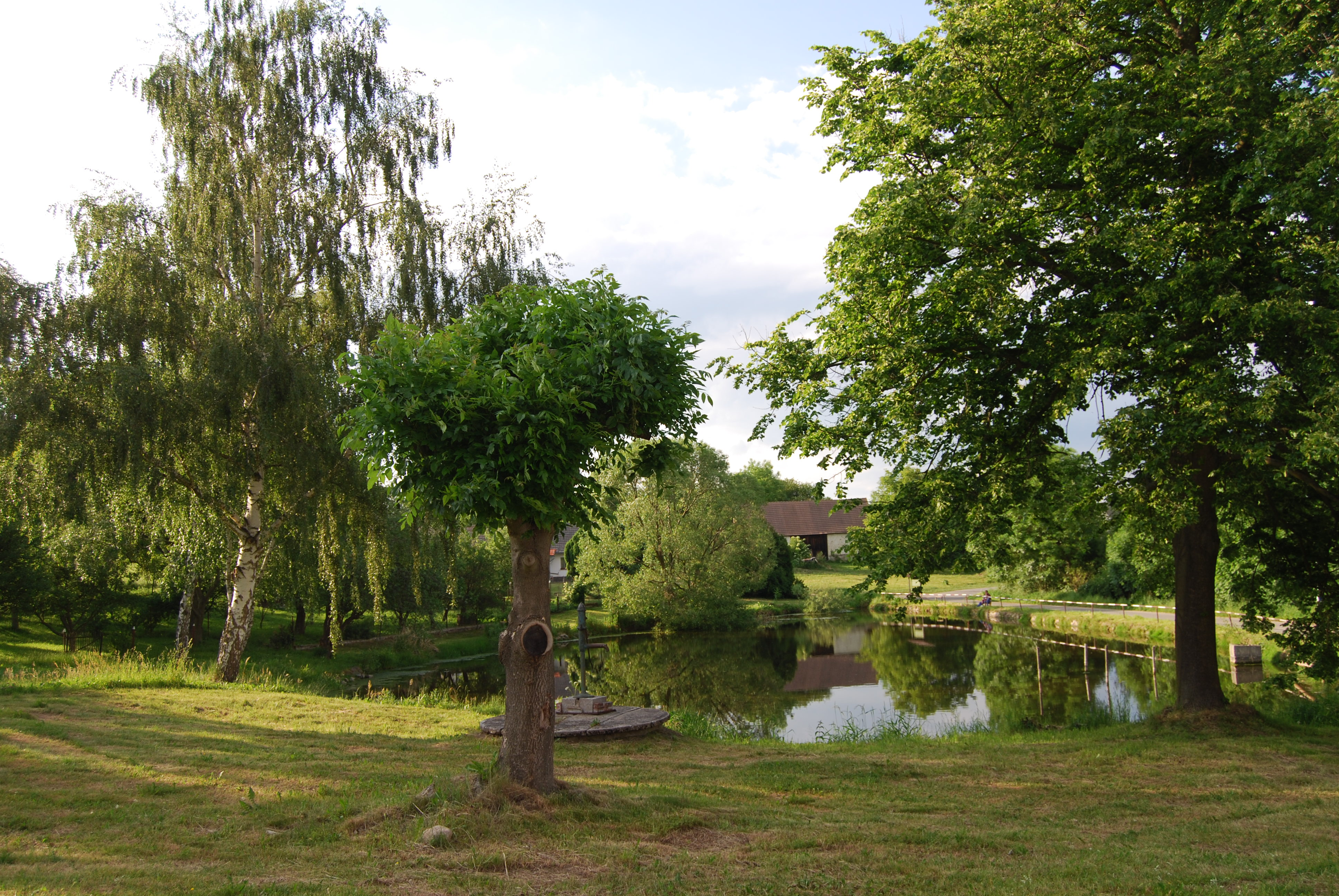 Pohled na návesní rybník. Jarotice je malá vesnice, část města Mirotice v okrese Písek. Česká republika.